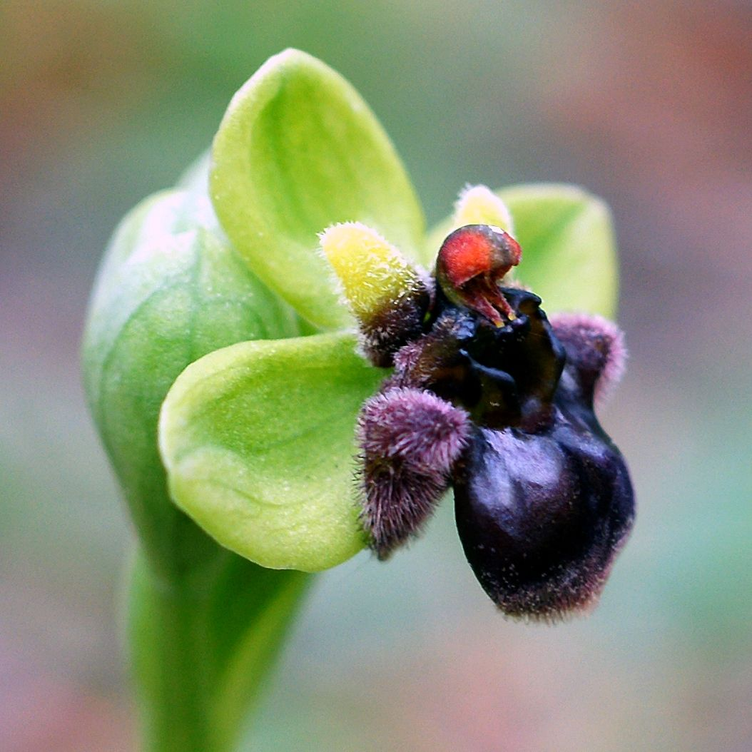 Ophrys bombyliflora - flower